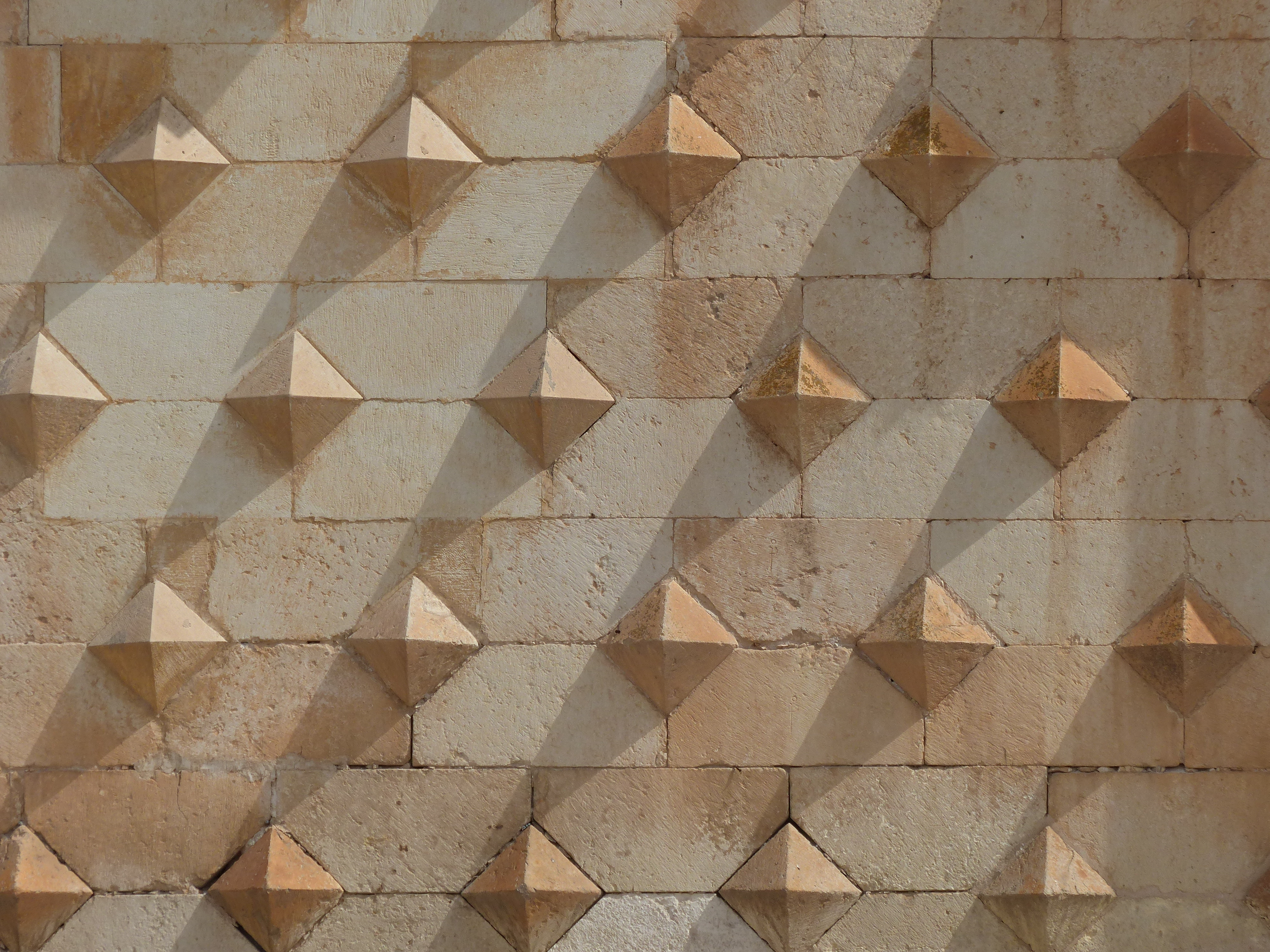 Palacio del Infantado, Guadalajara, España